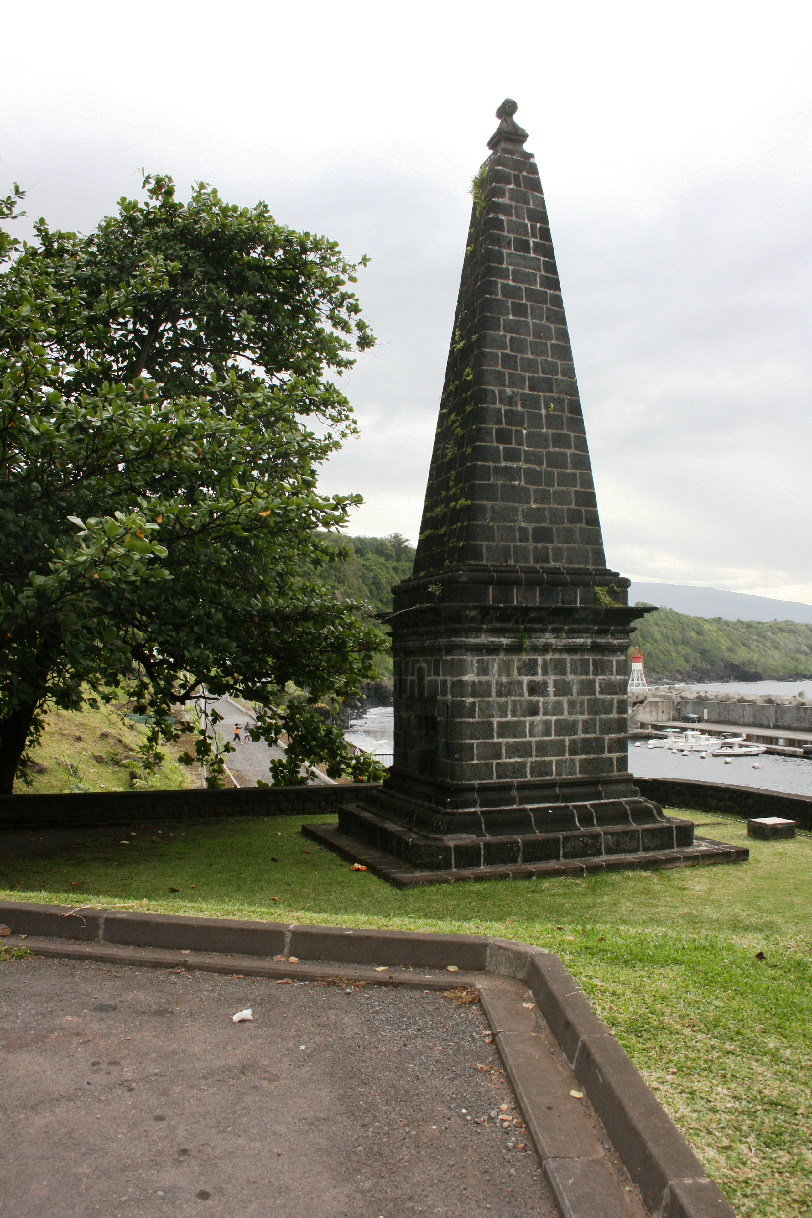 Le mausolée dressé pour le capitaine de vaisseau Robert Corbett, à la marine de Sainte-Rose, sur l'île de la Réunion